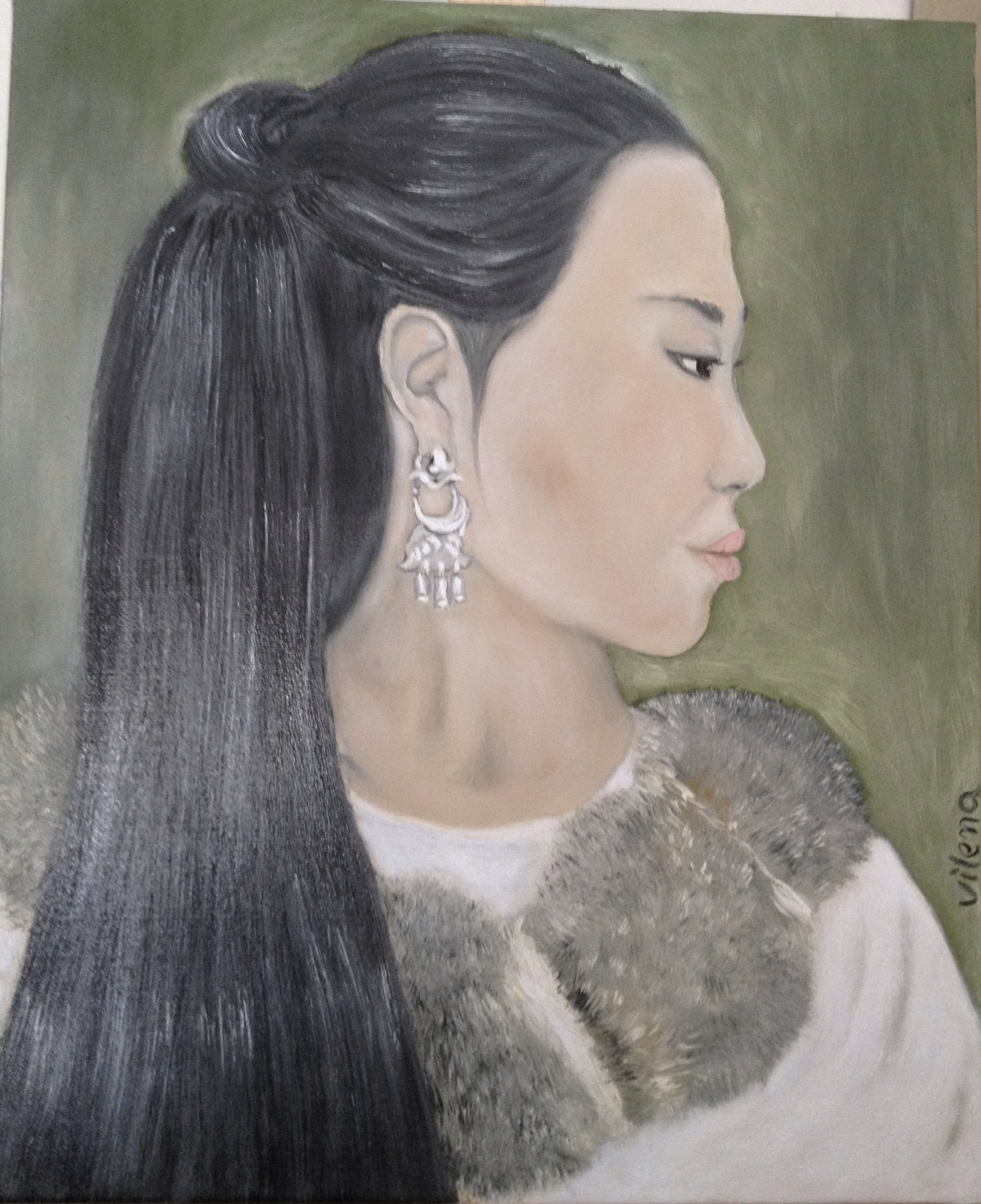 Саха тыла: Дьахтар киһи ийэ буолар аналлаах